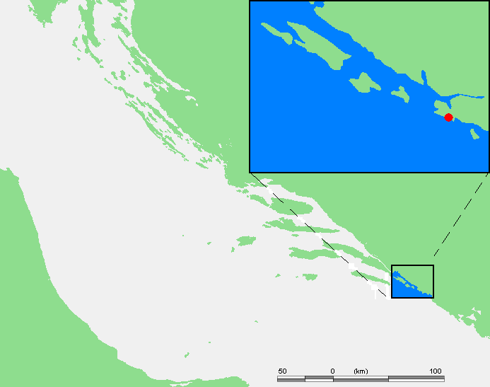 Dubrovnik